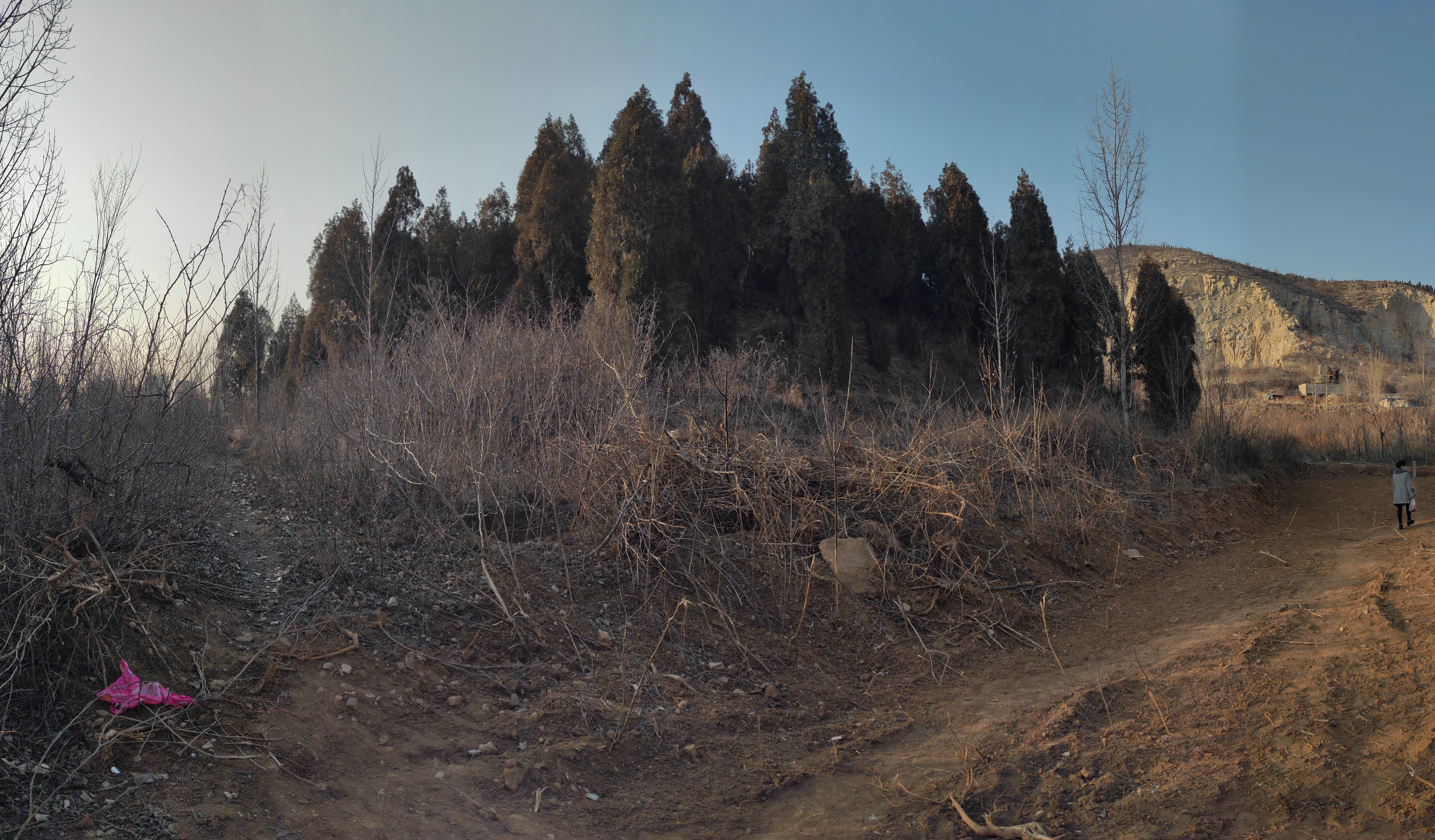 中文（中国大陆）: 李范村汉墓群北墓